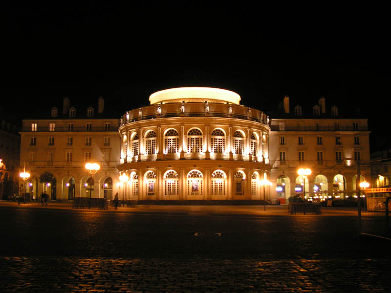 L'Opéra de Rennes, de nuit